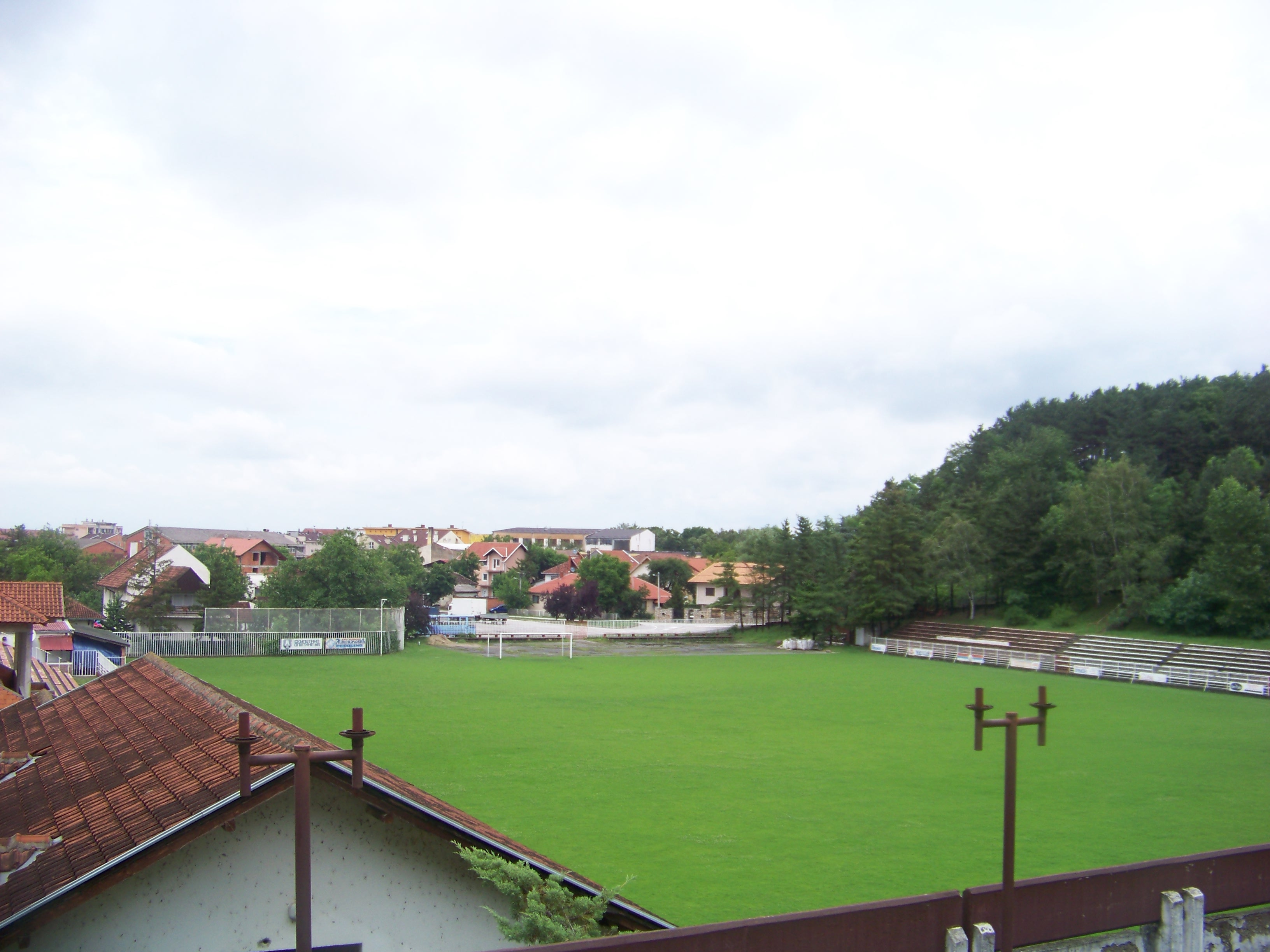 Spielfeld des Stadions